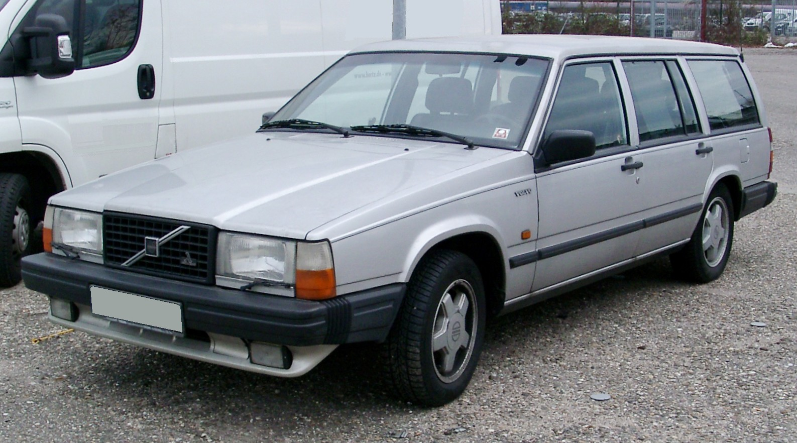 Volvo 740 GLT Kombi